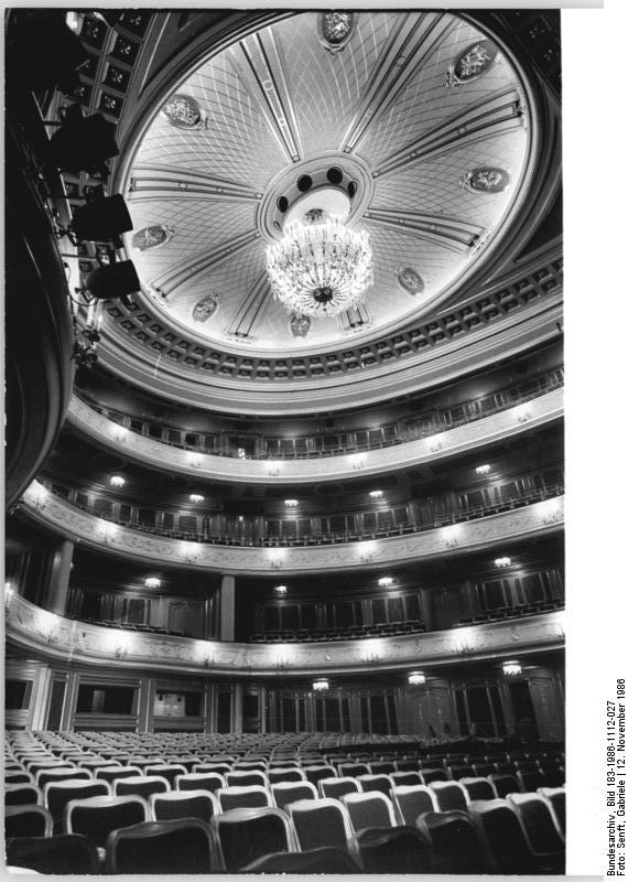 ADN-ZB Senft 12.11.86 Berlin: Staatsoper vor Wiedereröffnung Die Bestuhlung im Zuschauerraum der Deutschen Staatsoper erhielt im Rahmen einer umfassenden Rekonstruktion des Hauses neue Bezüge und Vergoldungen.